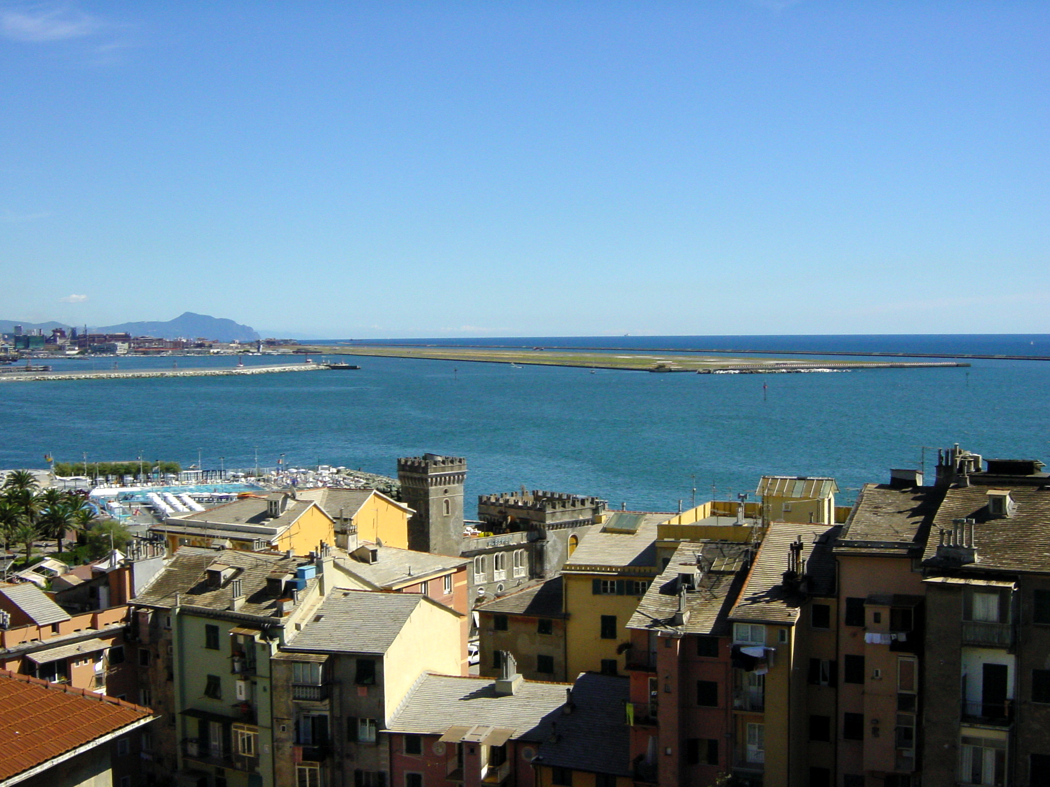 Pegli: sullo sfondo l'aeroporto e il Monte di Portofino